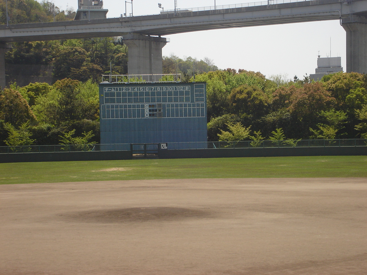 坂出市番の州球場。 - 日本国香川県坂出市にある野球場。